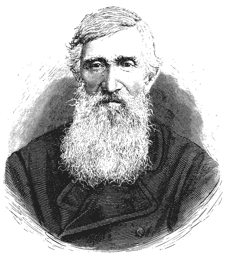 Срезневский, Измаил Иванович